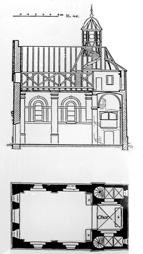 Grund- und Aufriss der Marienkapelle auf dem Karmelenberg bei Bassenheim. Es handelt sich um einen nachbearbeiteten Ausschnitt eines Fotos, das von einer Informationstafel auf dem Karmelenberg gemacht wurde. Selbst fotografiert, gemeinfrei.